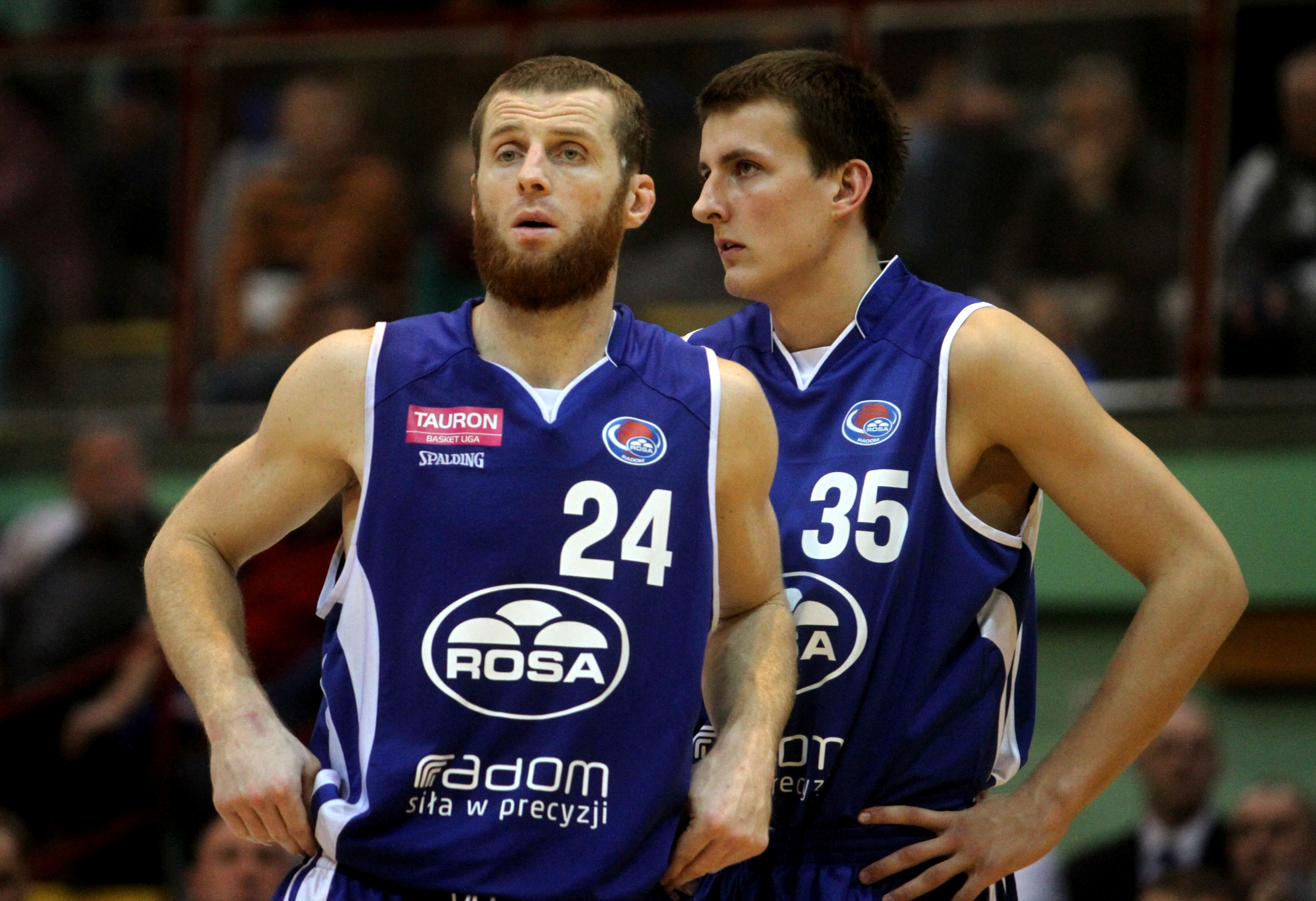 Jakub Dłoniak, Rosa Radom, Damian Jeszke, Rosa Radom